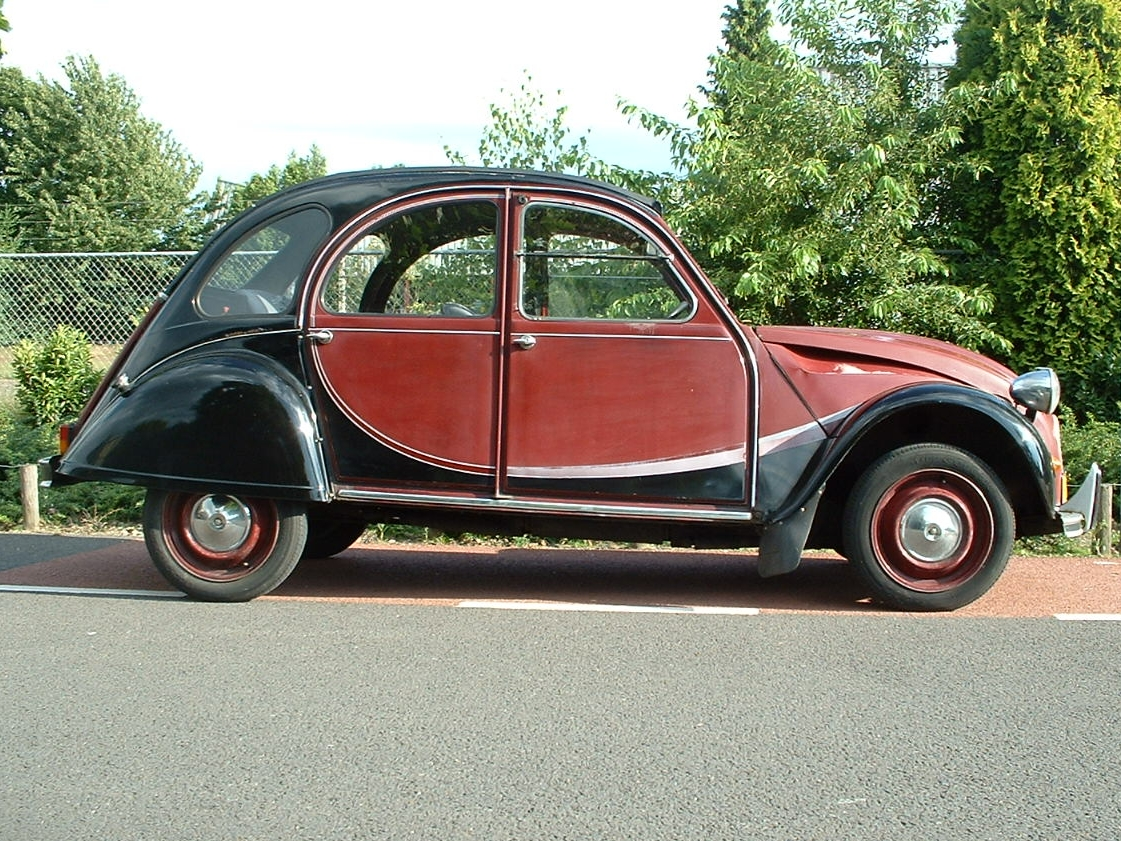 Citroen 2CV6 Charleston, 1983 model